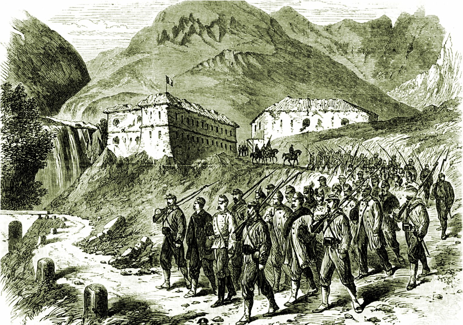 Guarnigione austriaca catturata dai garibaldini dopo la resa del Forte d'Ampola il 19 luglio 1866